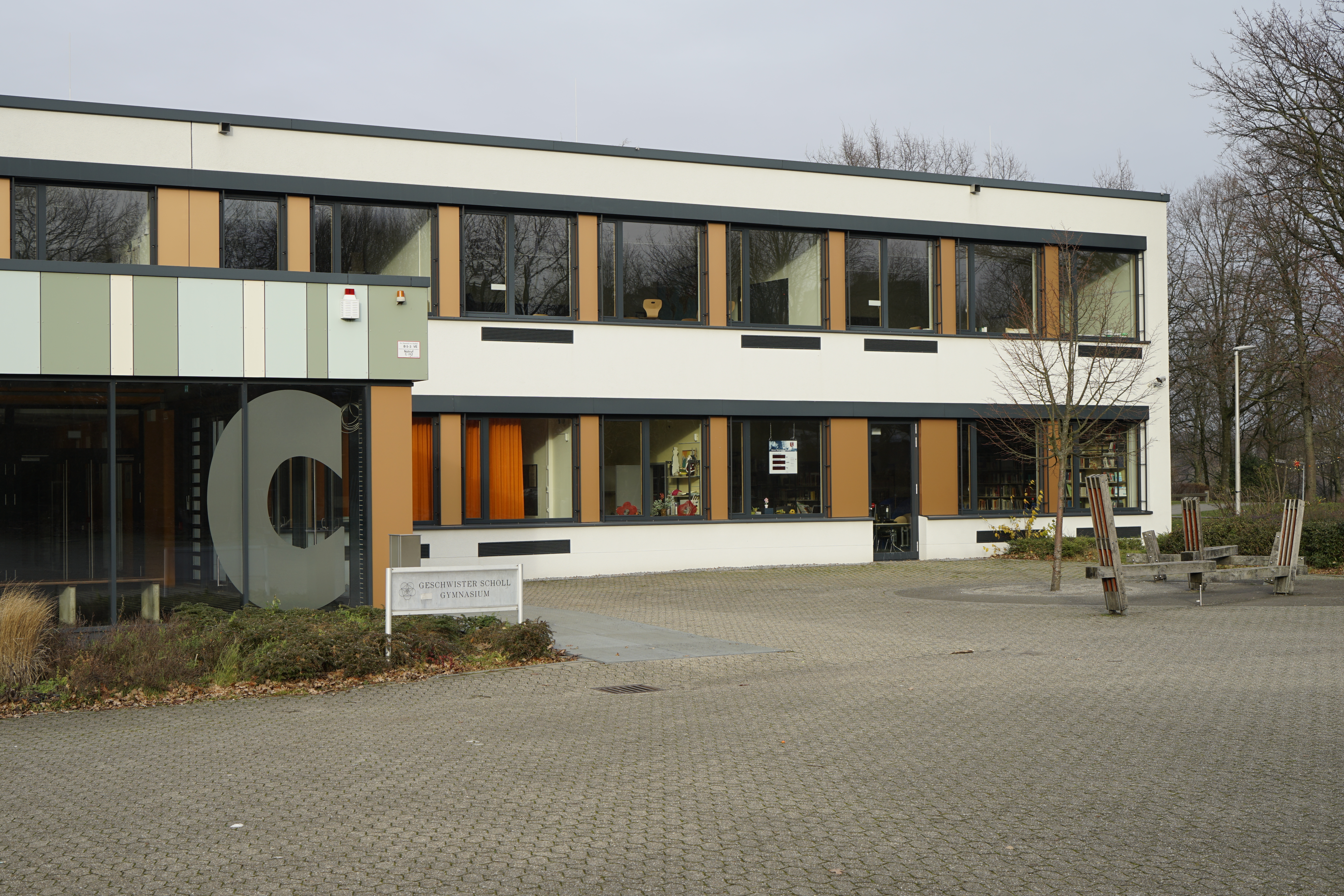 Eingangsbereich Geschwister-Scholl-Gymnasium in Velbert. Zugang zur Aula.